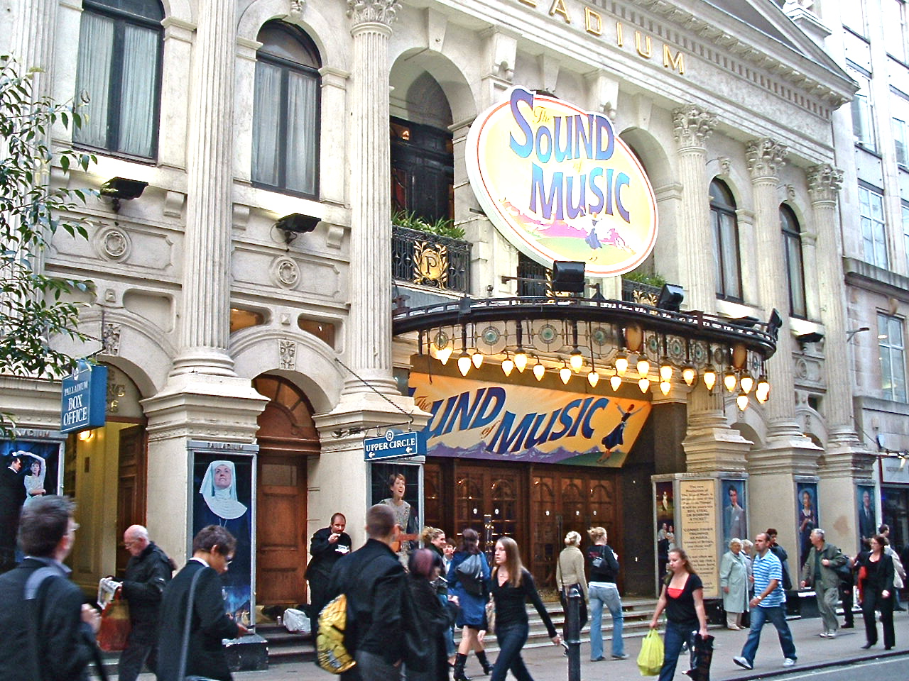 London Palladium, 2007